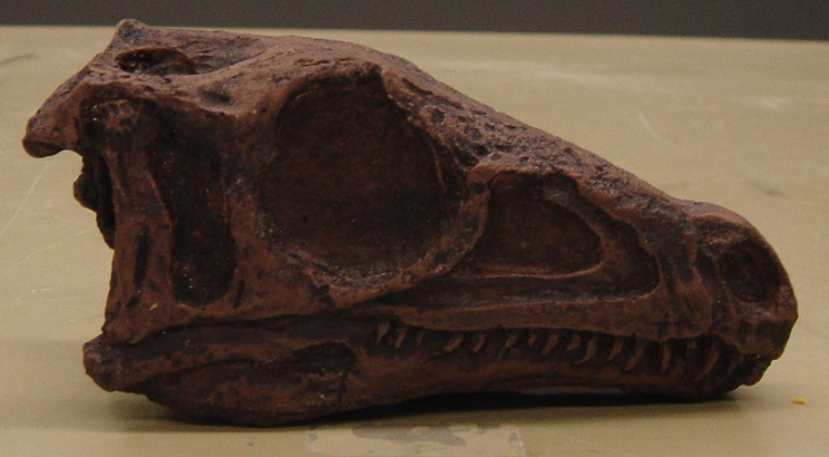 Eoraptor skull cast